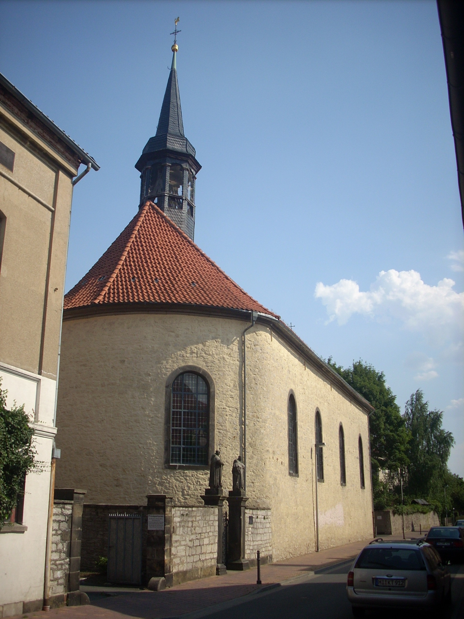 Gronau (Leine), Kath. Kirche St. Joseph